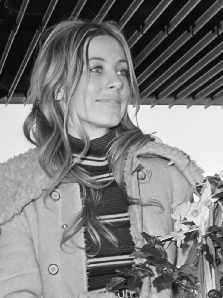 Aankomst van de Braziliaanse muzikant Sergio Mendes en zijn groep op Schiphol; Gracinha Leporace (echtgenote van Mendes), Sergio Mendes en Karen Philipp 5 maart 1971